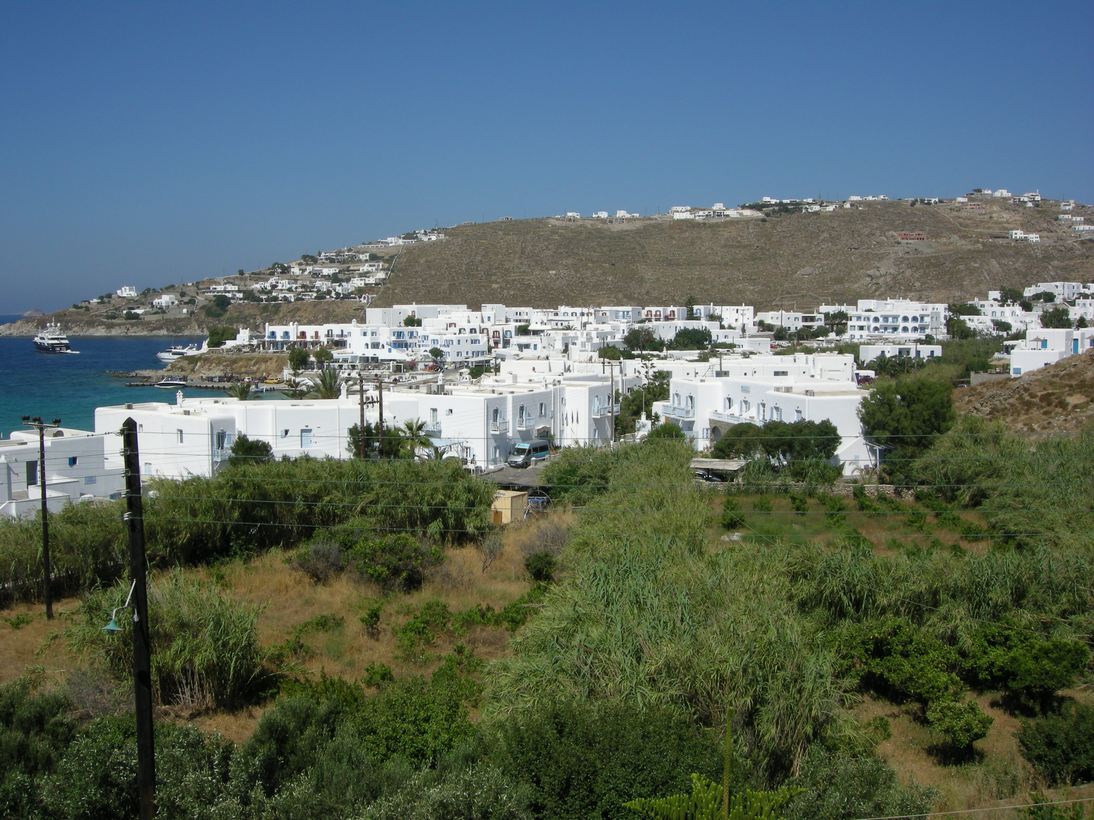 Psarou, mykonos